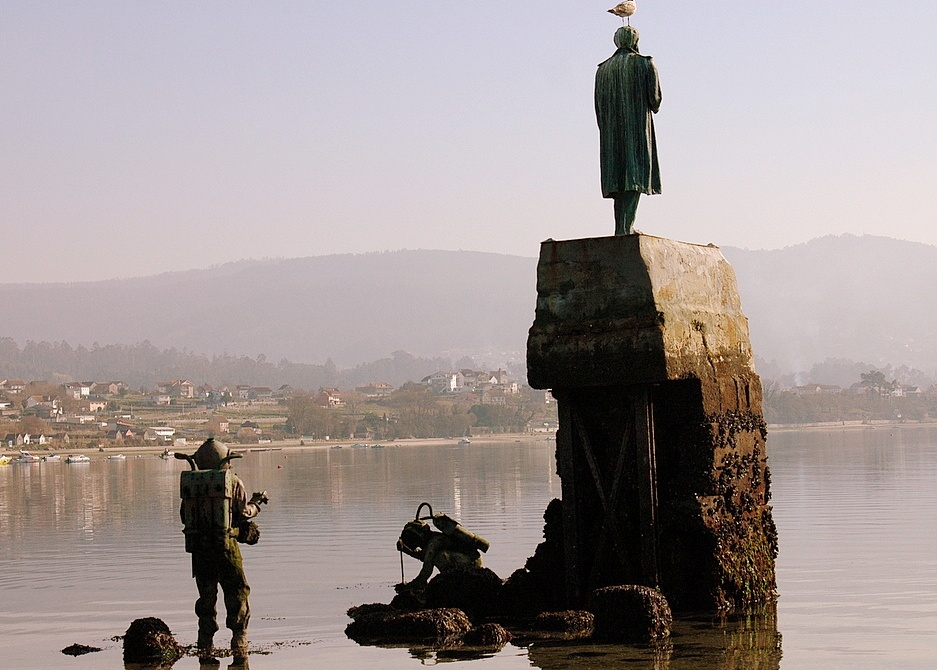 Cesantes-Redondela-Galicia. Autor: Sergio Portela Campos.'Lembrando_a_Xulio_Verne'